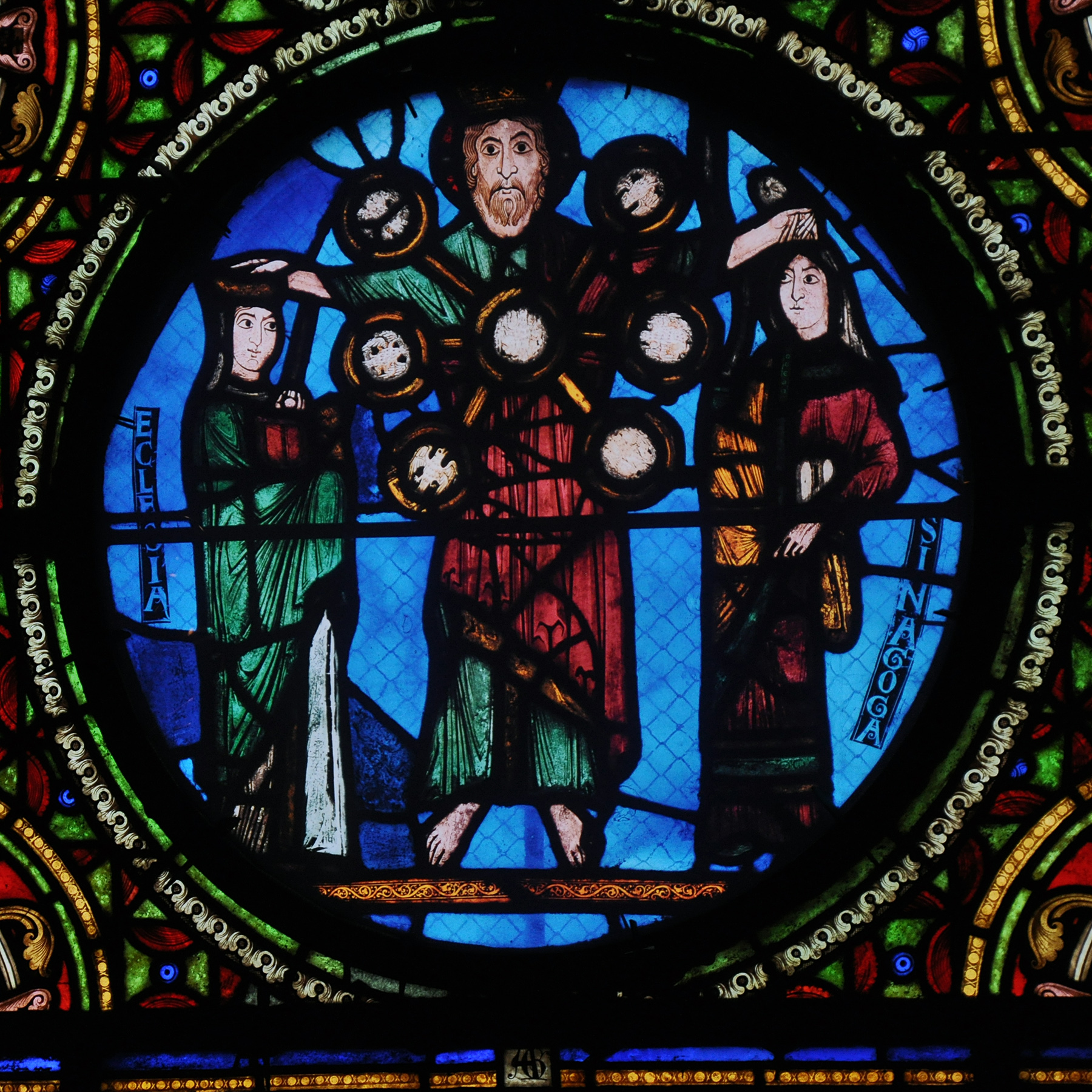 Vitrail de la Basilique Saint-Denis (chapelle Saint Pérégrin). Vitrail des Allégories de Saint Paul dit " vitrail anagogique". Détail d'un médaillon: le Christ entre l'Eglise et la Synagogue. Abbé Suger, 12ème siècle.